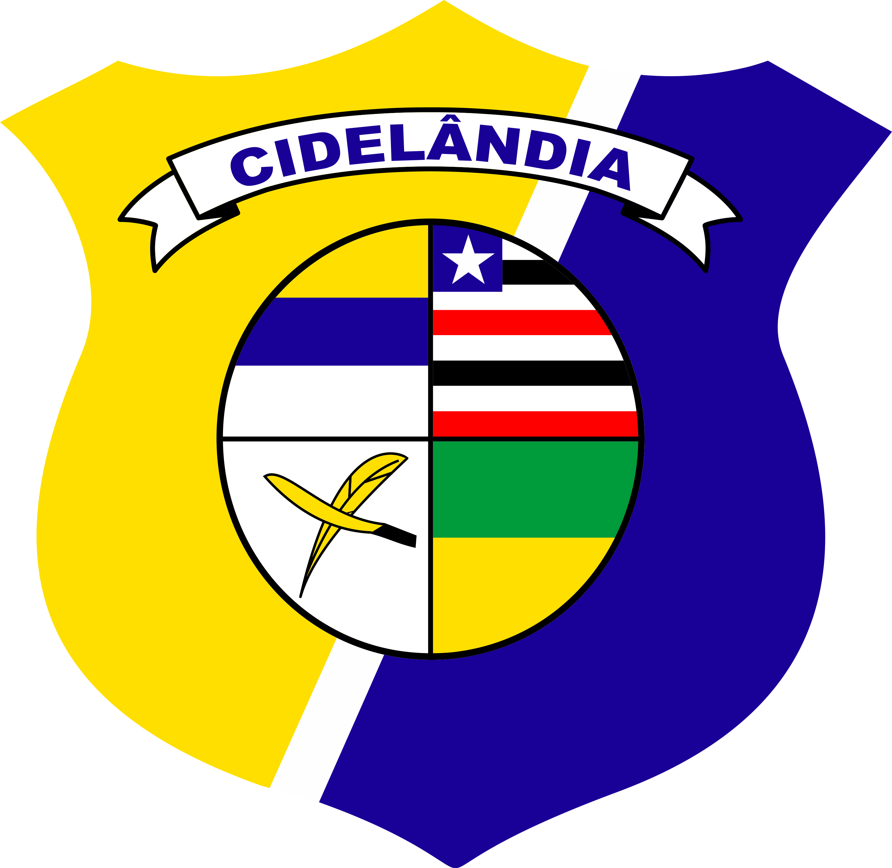 Brasão Municipal Oficial de Cidelândia - Maranhão